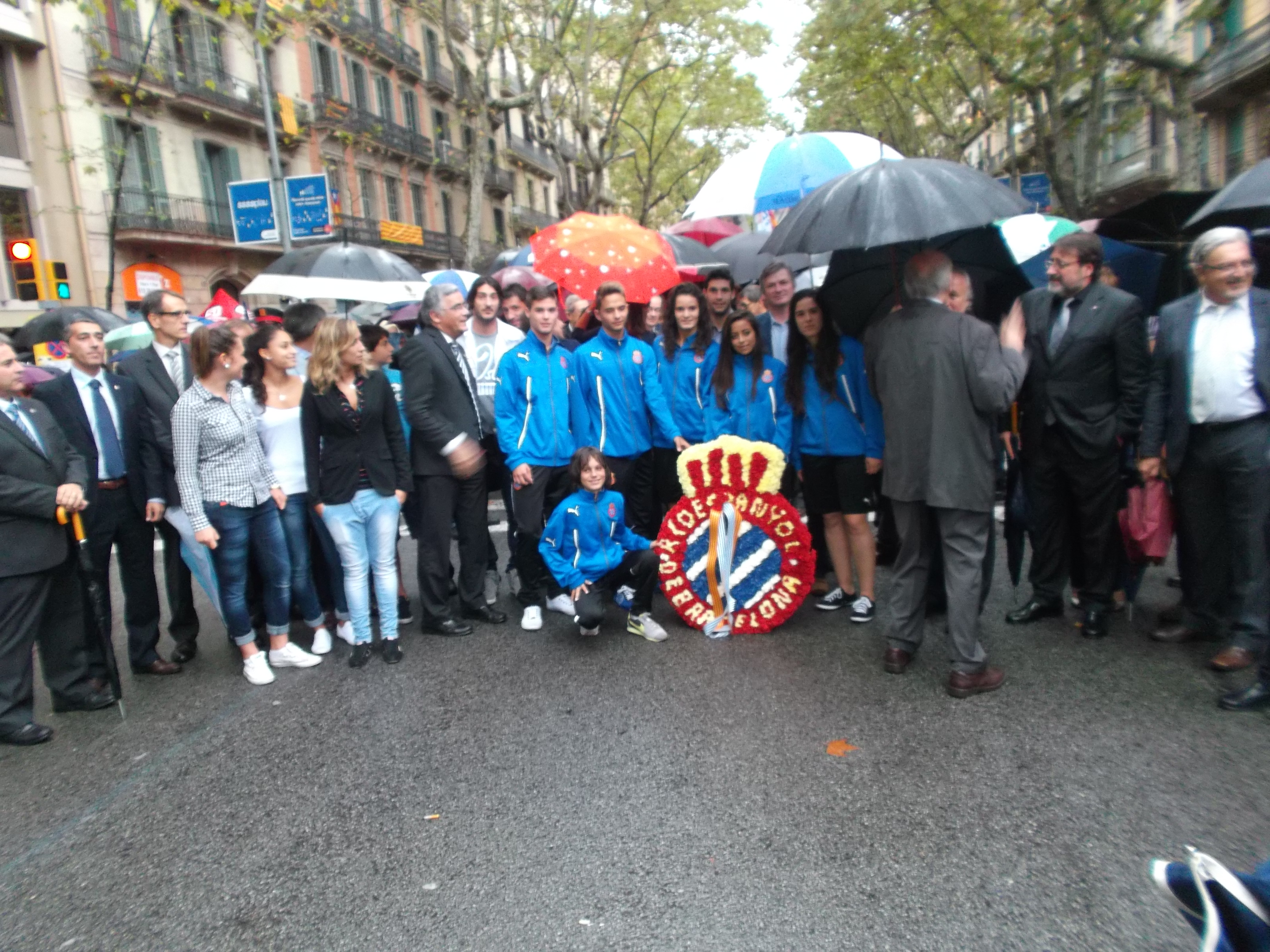 Ofrena floral RCDE 11/9/2013